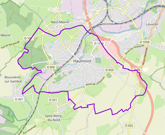 carte réalisée sur umap This map may be incomplete, and may contain errors. Don't rely solely on it for navigation.